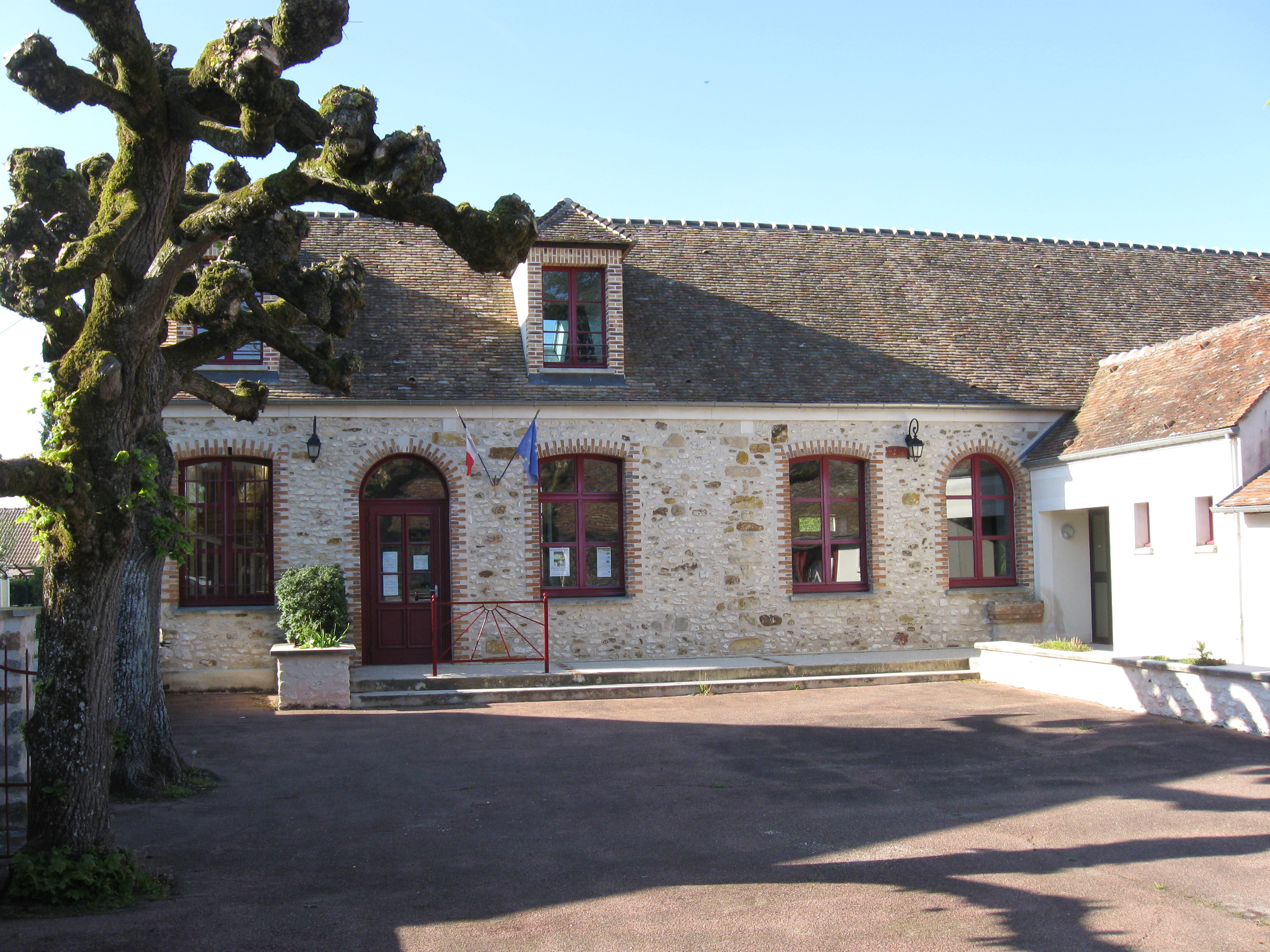 Mairie de Fontains. (Seine-et-Marne, région Île-de-France).